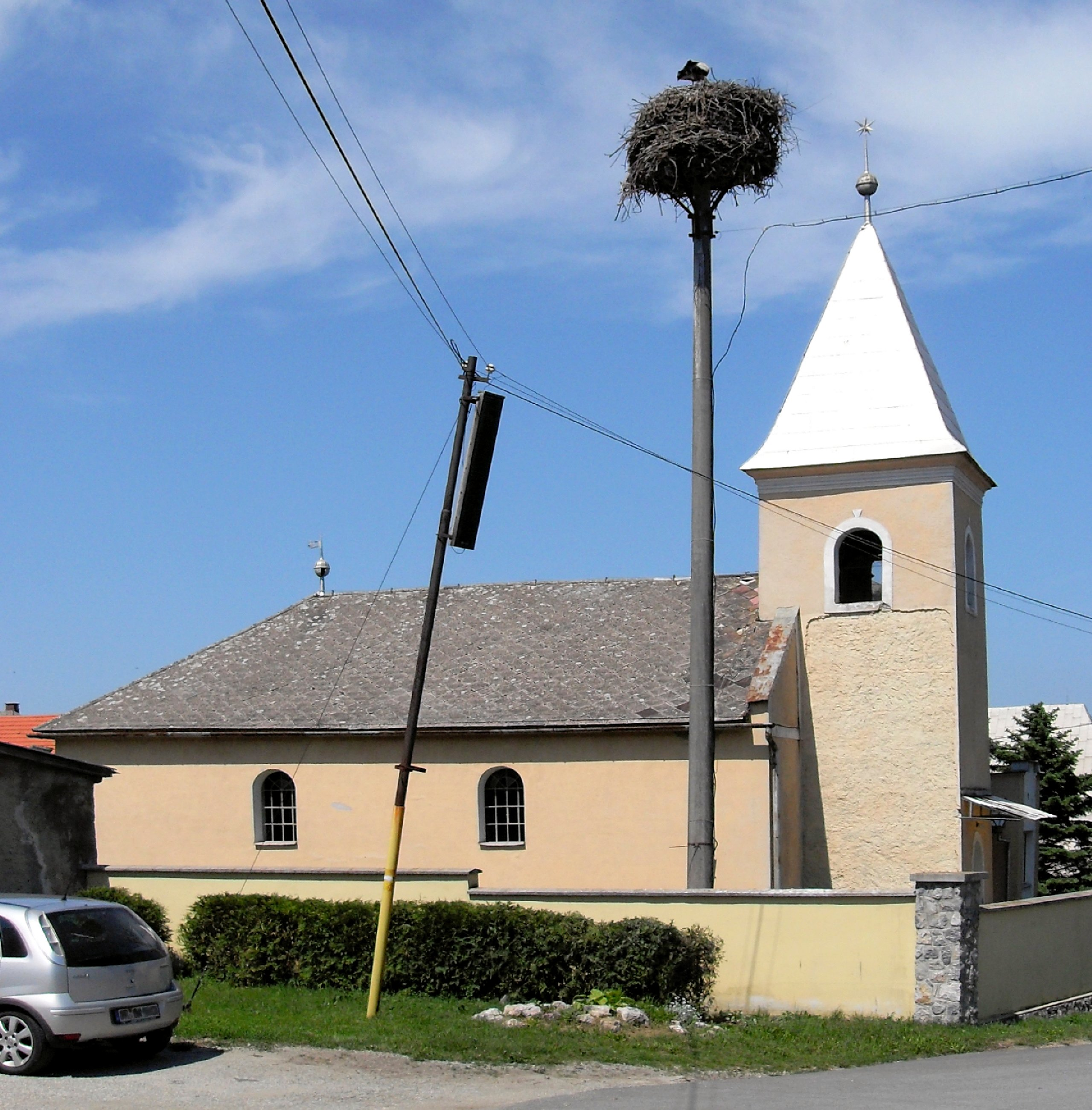 Lutheran kostol v Buzice